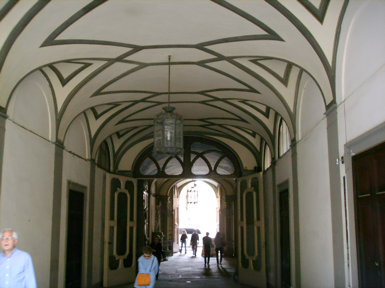 Palazzo antinori di brindisi, atrio